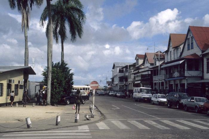 Dia. Henck Arronstraat (eerder Gravenstraat), links op de hoek een school